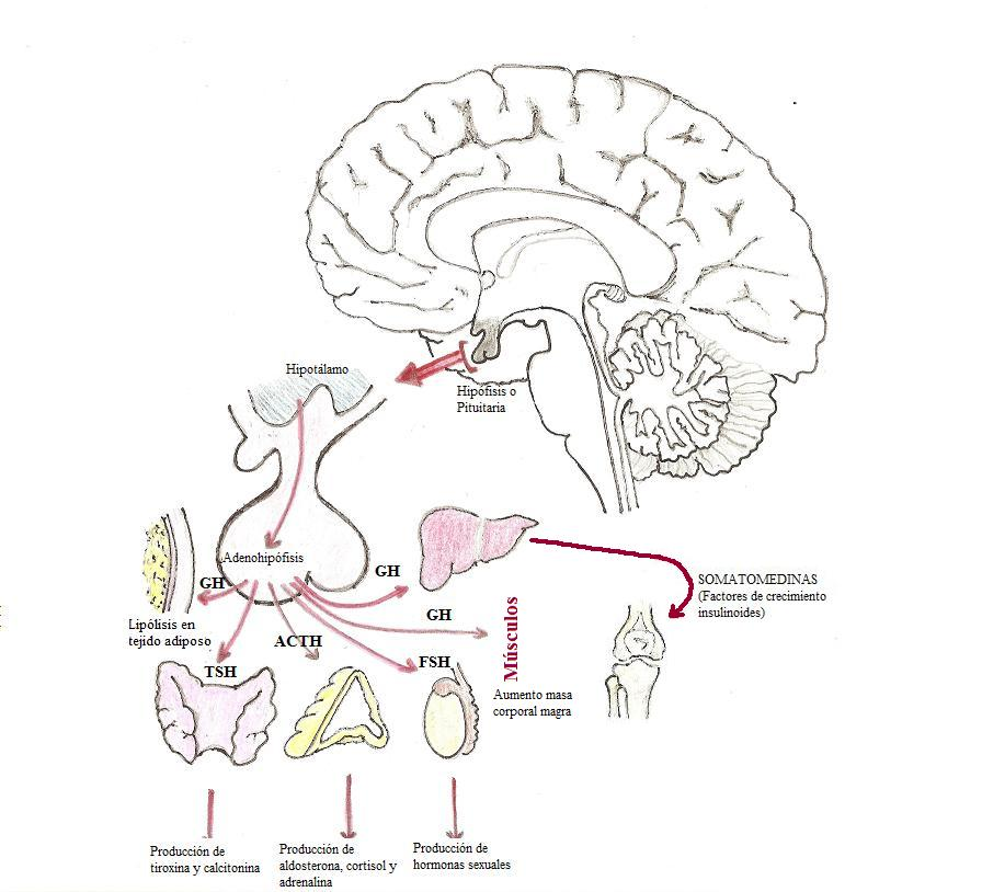 Accion de la hipofisis sobre organos diana